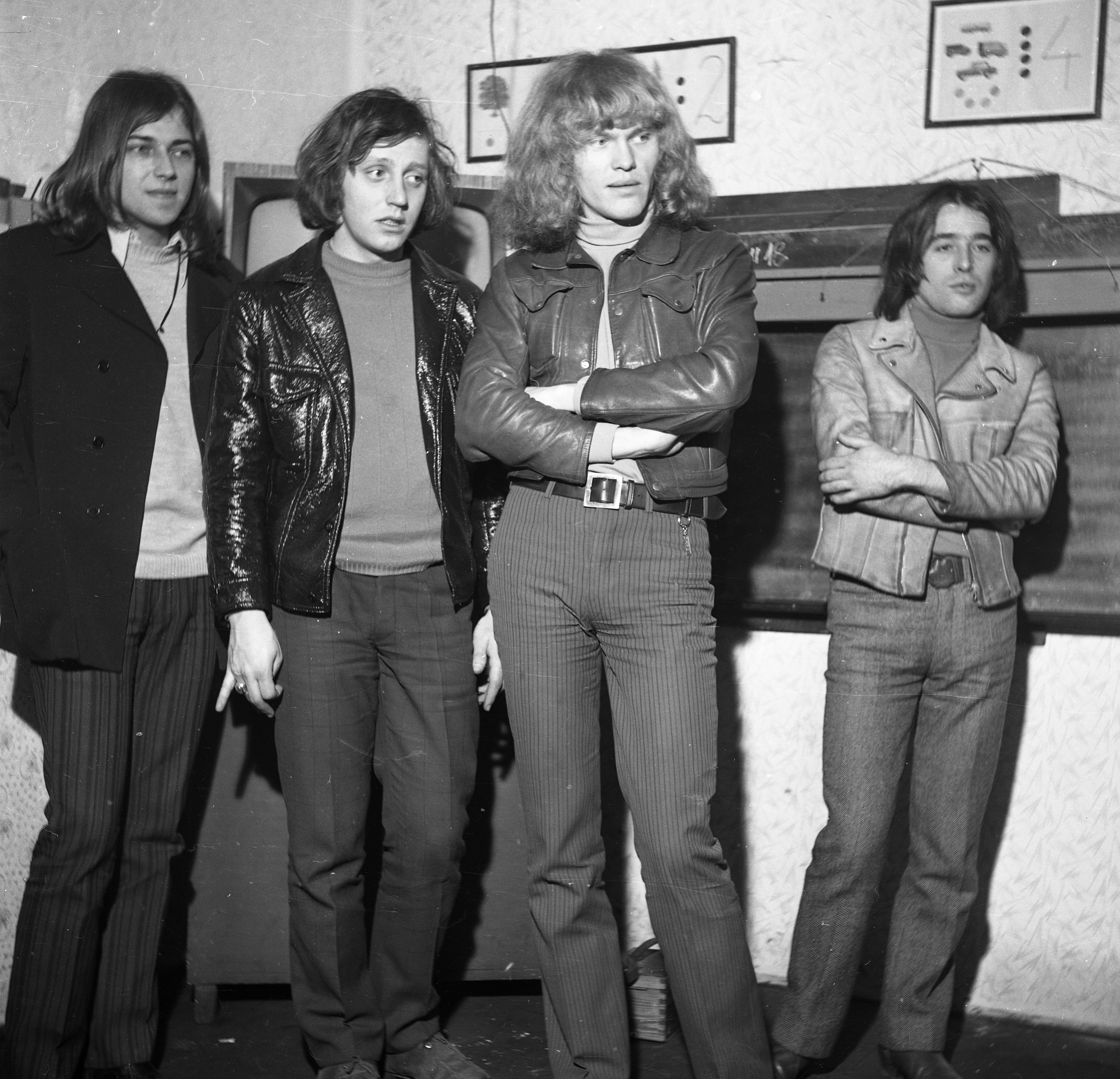 Omega Kossuth-díjas és Liszt Ferenc-díjas magyar rockegyüttes